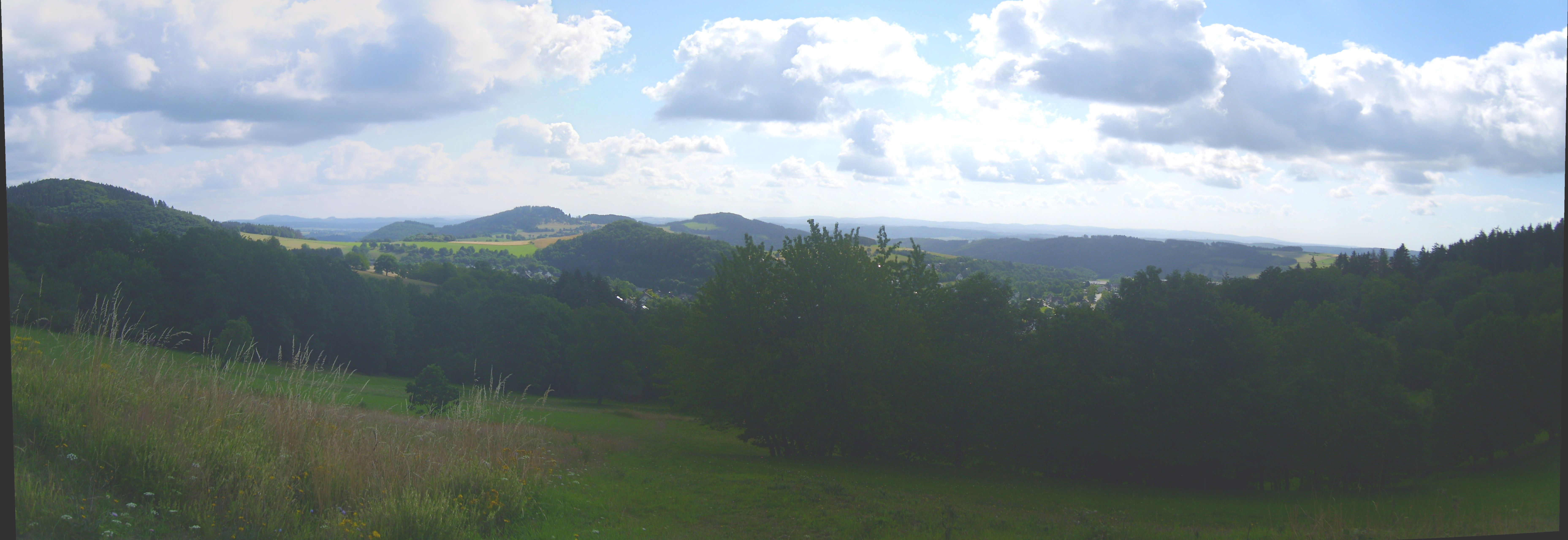 Blick von der Ostflanke des Hilmesbergs (635 m) an der Auffahrt zum Bollerberg (758 m); links der Stolzenberg (624 m), von dem aus sich die unbewaldete Niedrigwasserscheide zwischen Nuhne und Orke zu Stemmberg (572 m, halblinks) und Linsenberg (566 m, Mitte) zieht, nördlich deren das Hallenberger Hügelland in die Medebacher Schiefe Ebene übergeht. Rechts der Bildmitte Hesborn, dahinter der bis 530 m hohe Grat des Galgenbergs. Rechts des Stolzenbergs im Hintergrund der Eisenberg (560 m; 18,6 km), der jedoch größtenteils vom Eschenberg (535 m; 13,9 km) verdeckt wird, rechts davon der Nebengrat Böhlen (495 m; 15,5 km). Im Hintergrund der rechten Bildhälfte der Kellerwald, von dem besonders das Hohe Lohr (657 m; 31,5 km) hervorsticht. – siehe Udeuschle